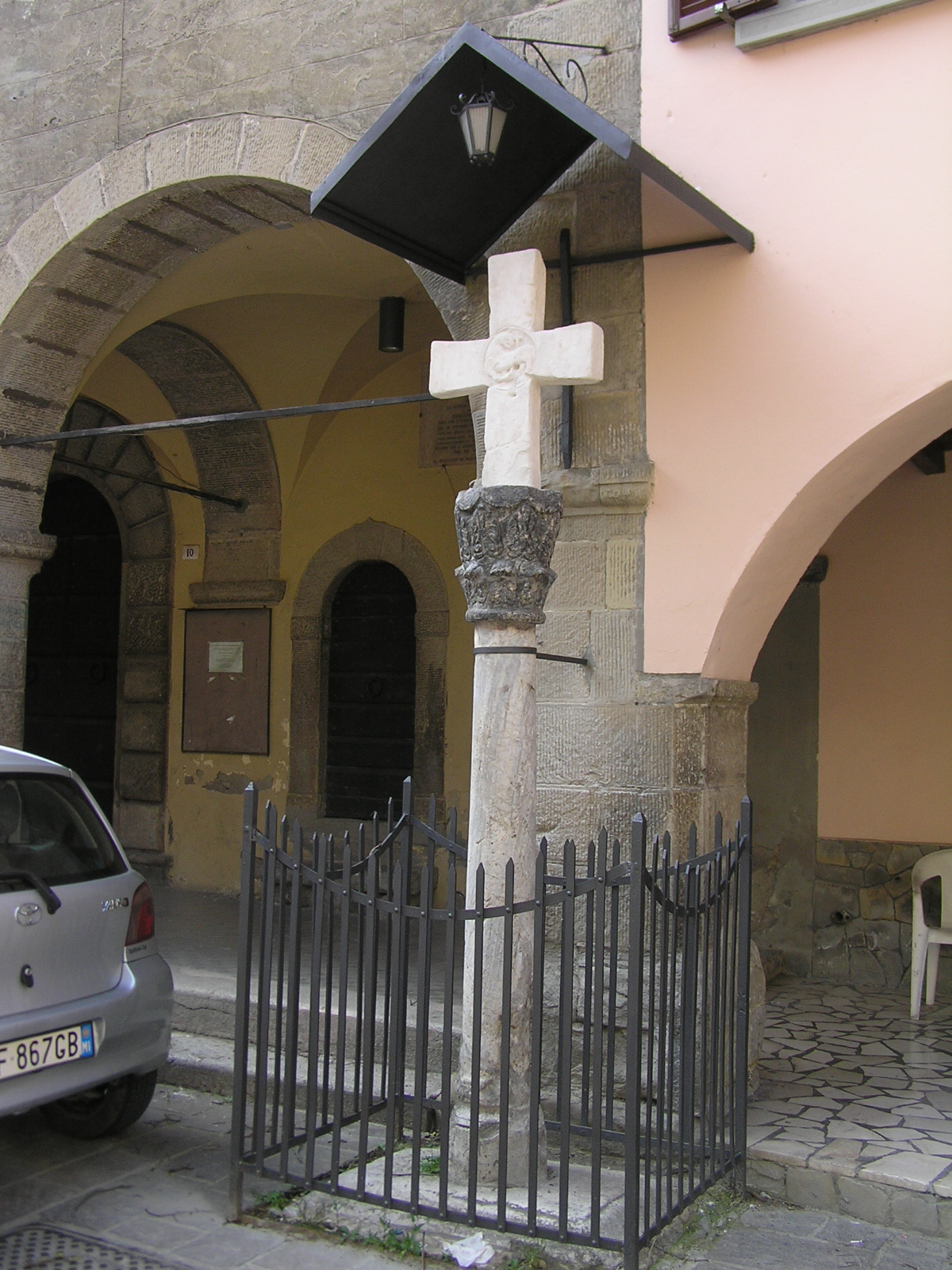 croce viaria che si trova a Galeata in via Zannetti e che segnava l'antico ingresso al paese dalla via Gallica. Sui lati reca scolpiti un "Agnus Dei" ed una "Dextra Dei", scolpiti su marmo bianco grigio venato, e dalla resa assai naturalistica dei rilievi è databile circa al XII - XIII secolo.